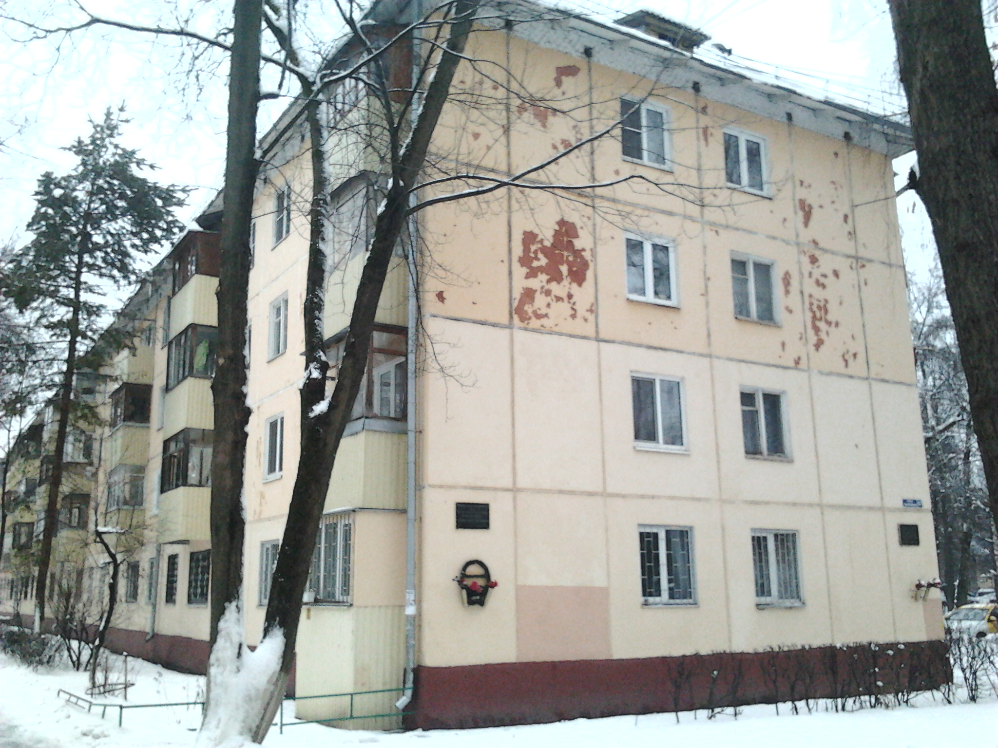 Дом на улице Парковой, 57. В этом доме жили Герой Советского союза А. П. Кондрашёв и кавалер Ордена Мужества Е. П. Рыбников.